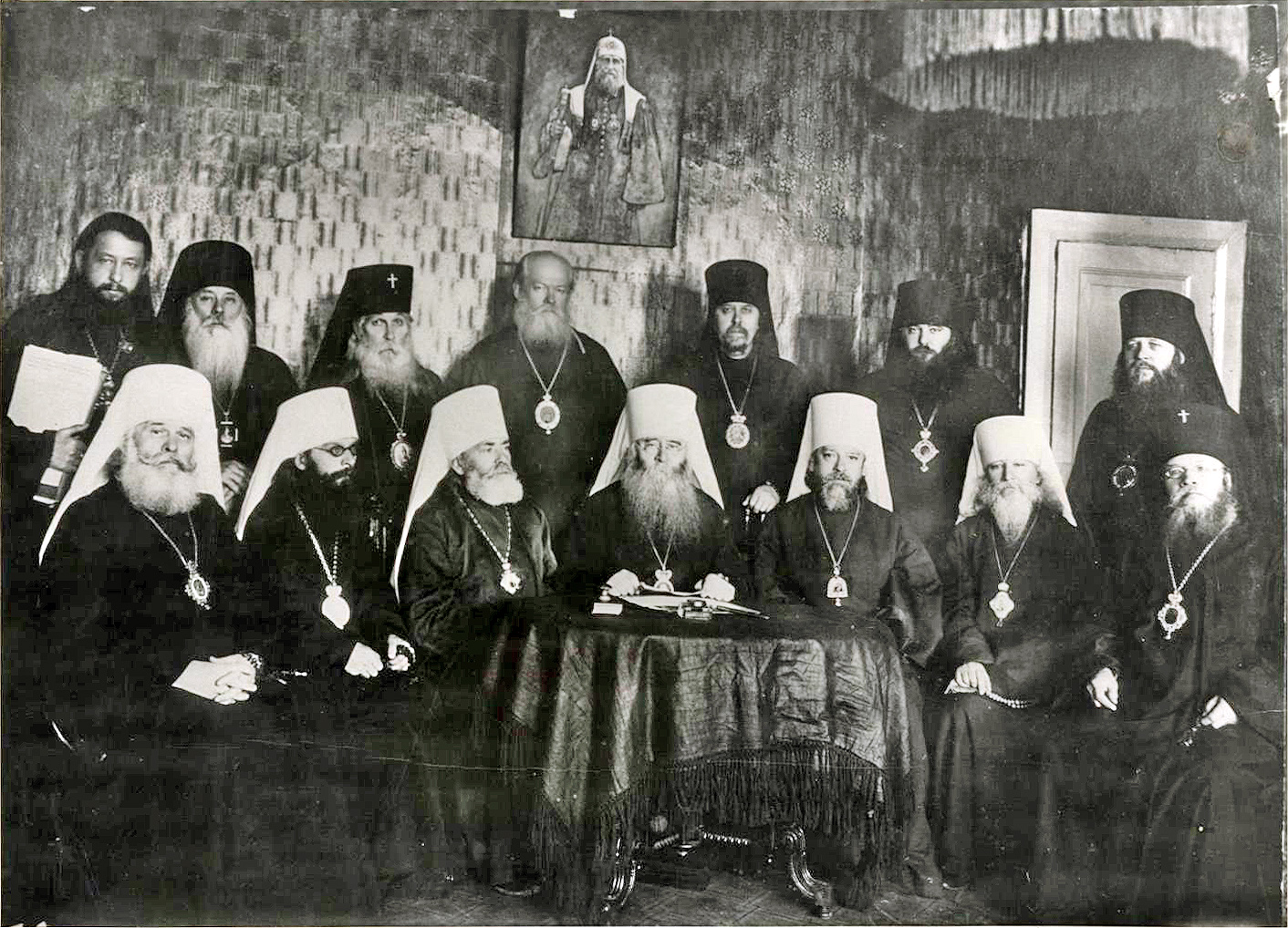 зимняя сессия 1933-1934 годов Временного Патриаршего Священного Синода. Нижний ряд: митрополит Константин (Дьяков) митрополит Анатолий (Грисюк) митрополит Арсений (Стадницкий) митрополит Сергий (Страгородский) митрополит Алексий (Симанский) митрополит Серафим (Александров) архиепископ Павел (Гальковский) Верхний ряд: протоиерей Александр Лебедев епископ Винницкий Александр (Петровский) архиепископ Александр (Похвалинский) архиепископ Елецкий Сергий (Зверев) епископ Владимирский Иннокентий (Летяев) архиепископ Дмитровский Питирим (Крылов) архиепископ Ирбитский Макарий (Звёздов)